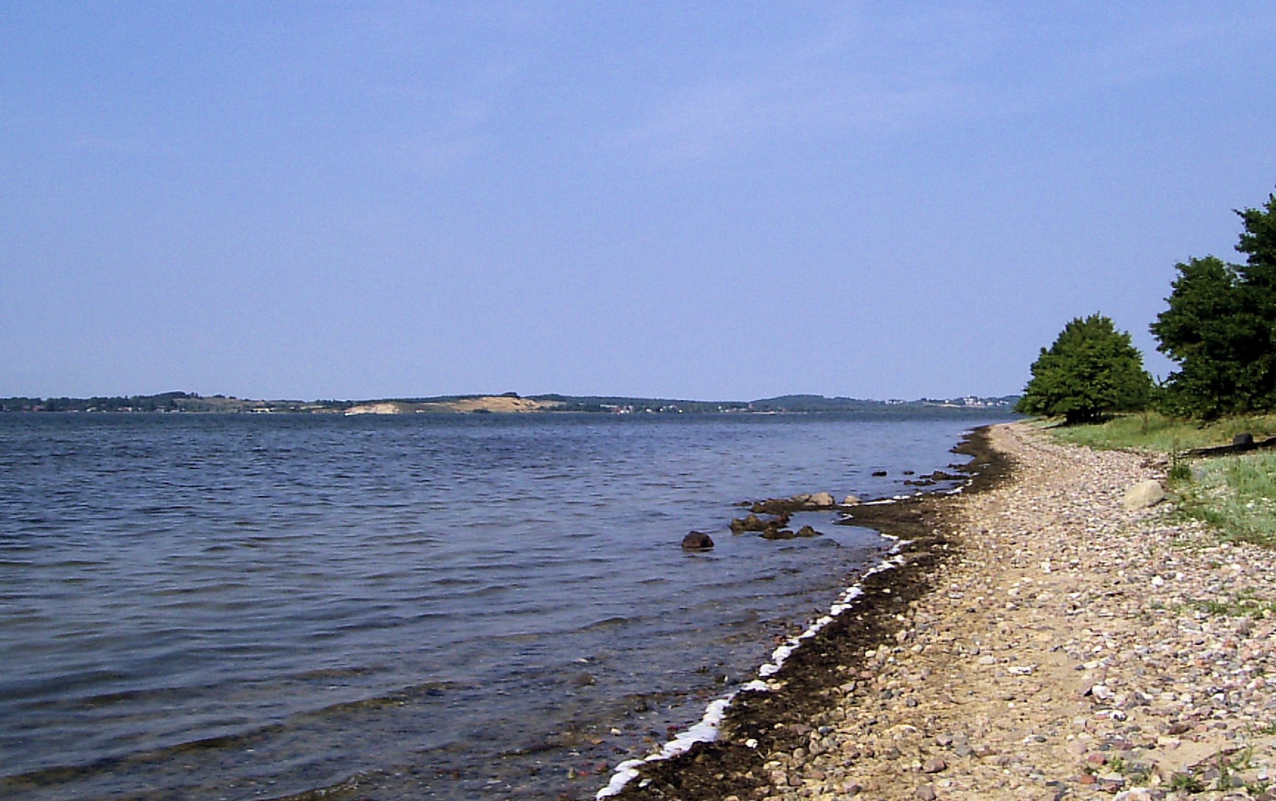 Blick über die Hagensche Wiek in Richtung Reddevitzer Höft